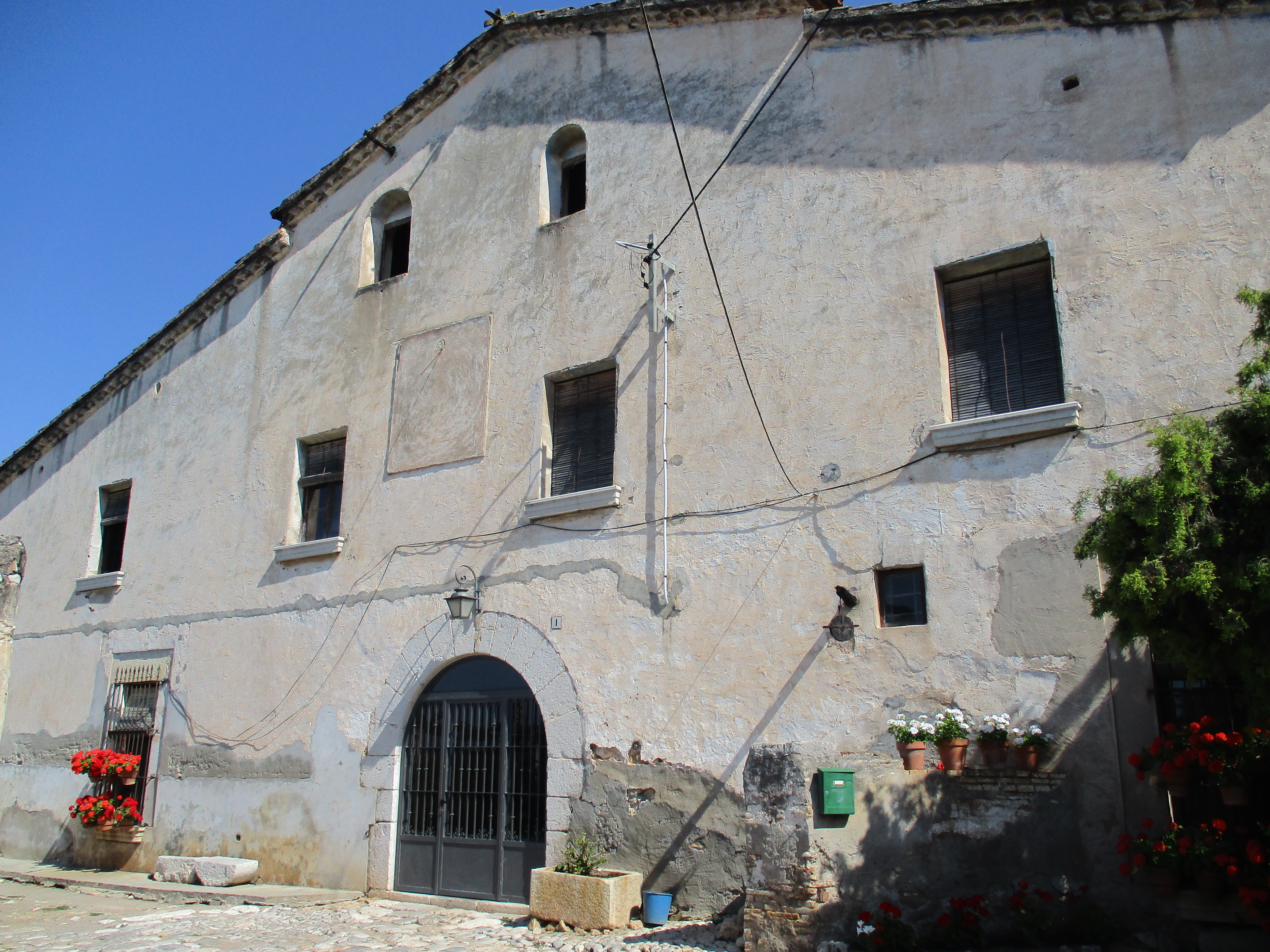 Can Roig de les Torres (Sant Pere de Ribes)